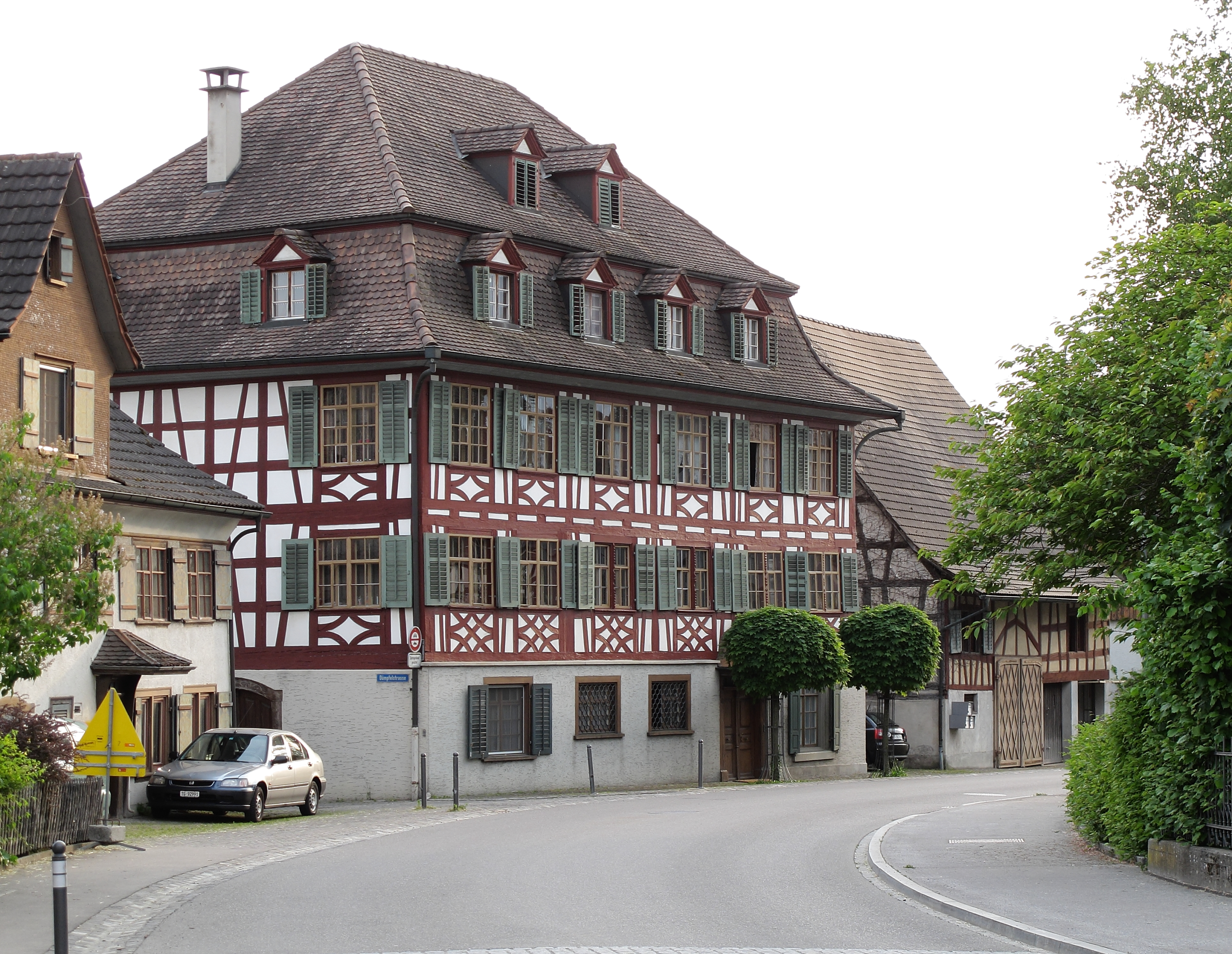 Wohnhaus Alter Löwen